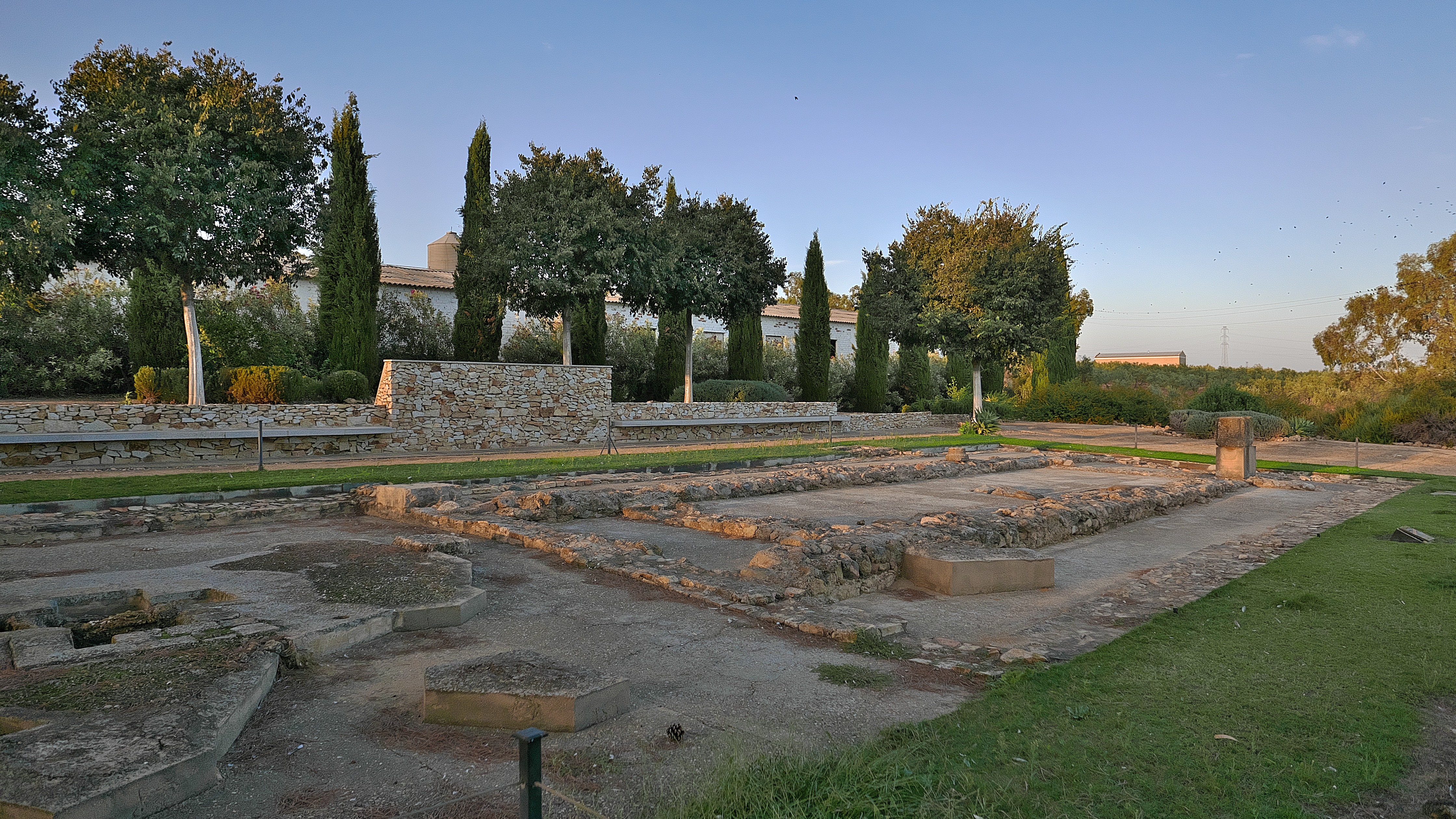 Panorámica de los restos arquitectónicos (ss. V-VIII) Basílica semejante, Category:Basílica paleocristiana de Bovalar (de Bobalá)